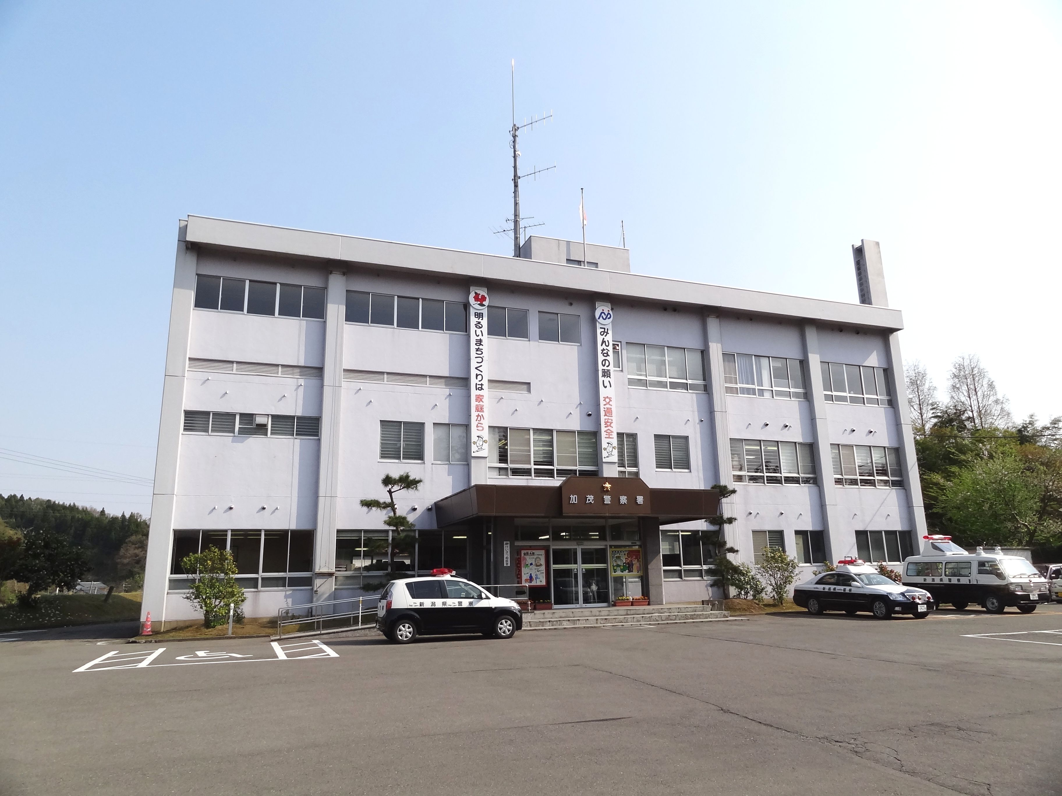 新潟県警察 加茂警察署